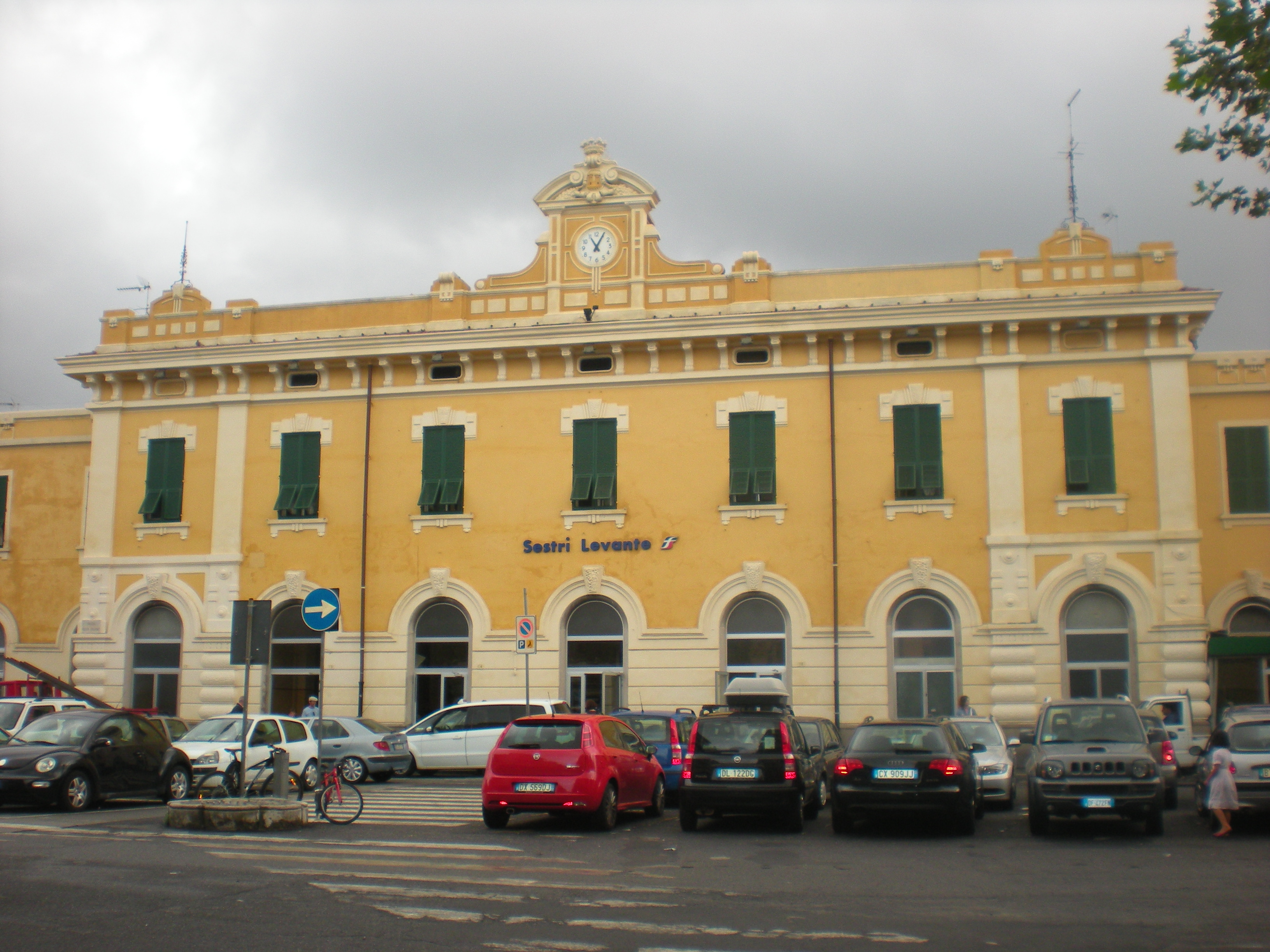 Bahnhofsgebäude von Sestri Levante